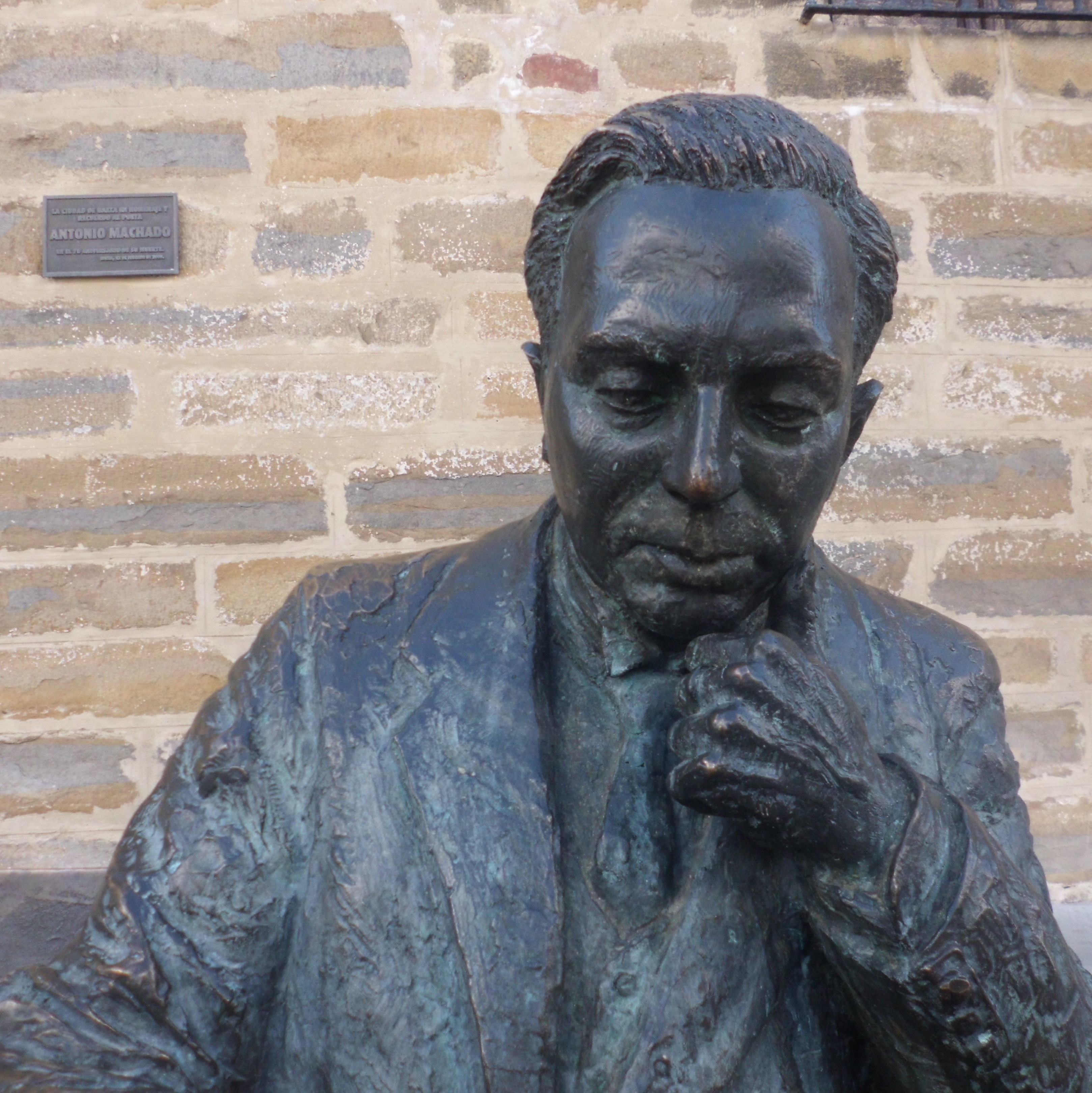 Fotografía de la estatua sedente de Antonio Machado, colocada en la calle san Pablo de Baeza (Jaén), que he tomado con mi cámara digital CASIO EXILIM (14.1 MP 26 mm) la mañana del 18 de noviembre de 2016. Posteriormente, la he recortado con Picasa 3.